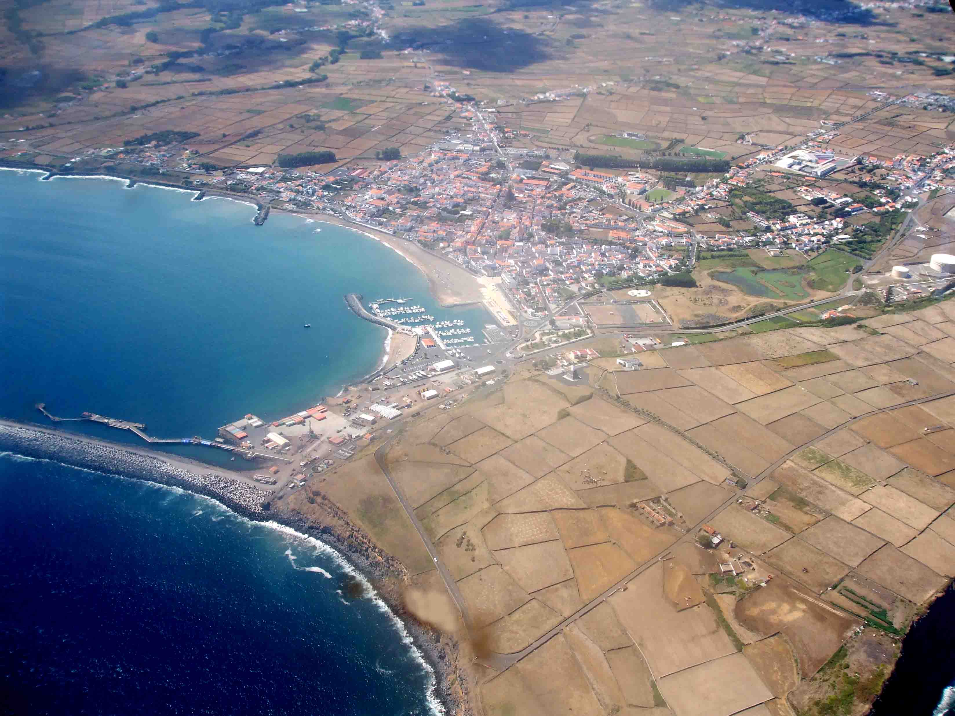 Vista parcial da Baía da Praia da Vitória, ilha Terceira, Açores, Portugal.